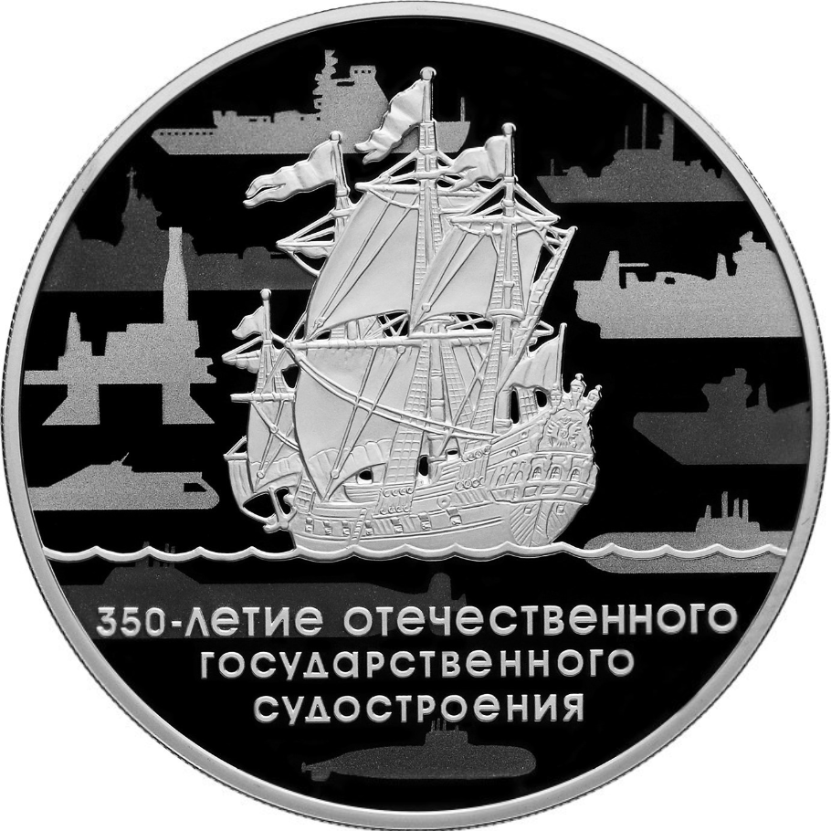 Монета Банка России, 350-летие отечественного государственного судостроения. 3 рубля, серебро, реверс, пруф. Изображение фрегата «Орёл» на фоне силуэтов современных судов, внизу – надпись в три строки: «350-ЛЕТИЕ ОТЕЧЕСТВЕННОГО ГОСУДАРСТВЕННОГО СУДОСТРОЕНИЯ». Чеканка — Санкт-Петербургский монетный двор. Художник: С.А. Козлов. Скульптор: О.Г. Шепель.